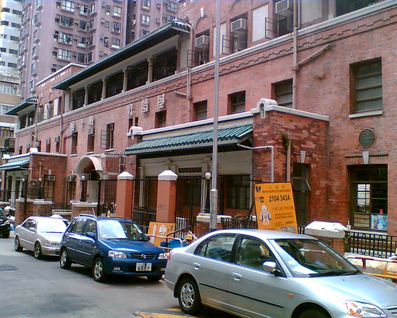 香港中華基督教青年會, 上環zh:必列者士街會所